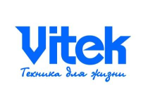 Старый логотип компании «Vitek»